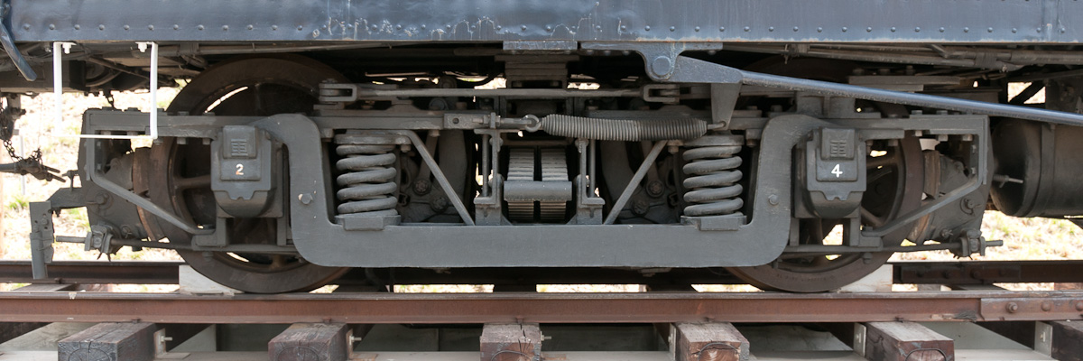 上田交通5253の日本車輌D形台車、長野計器丸子電子機器工場前の保存車。枕バネが2連であることからD14形の可能性が高い。